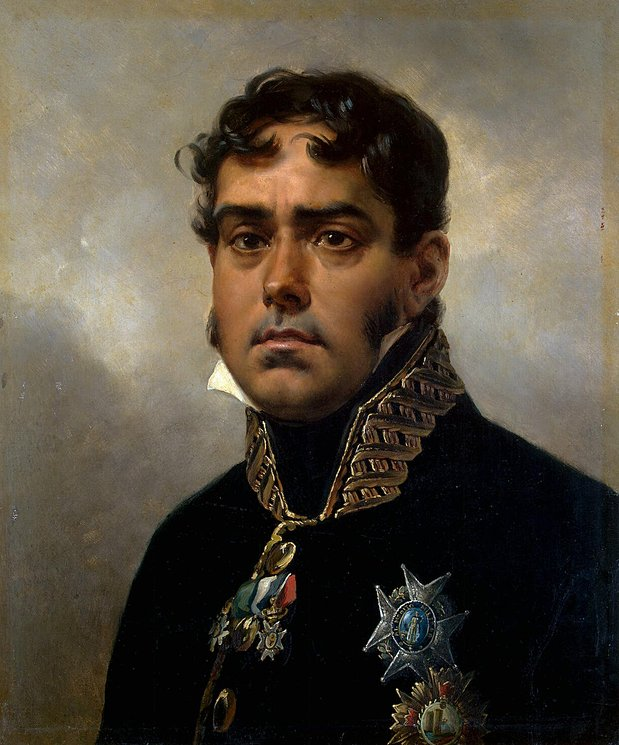 Retrato del militar español Pablo Morillo (1775-1837), que llegó a ser teniente general del ejército español, conde de Cartagena y marqués de la Puerta, y también gobernador y capitán general de Venezuela y capitán general de Castilla la Nueva y de Galicia.